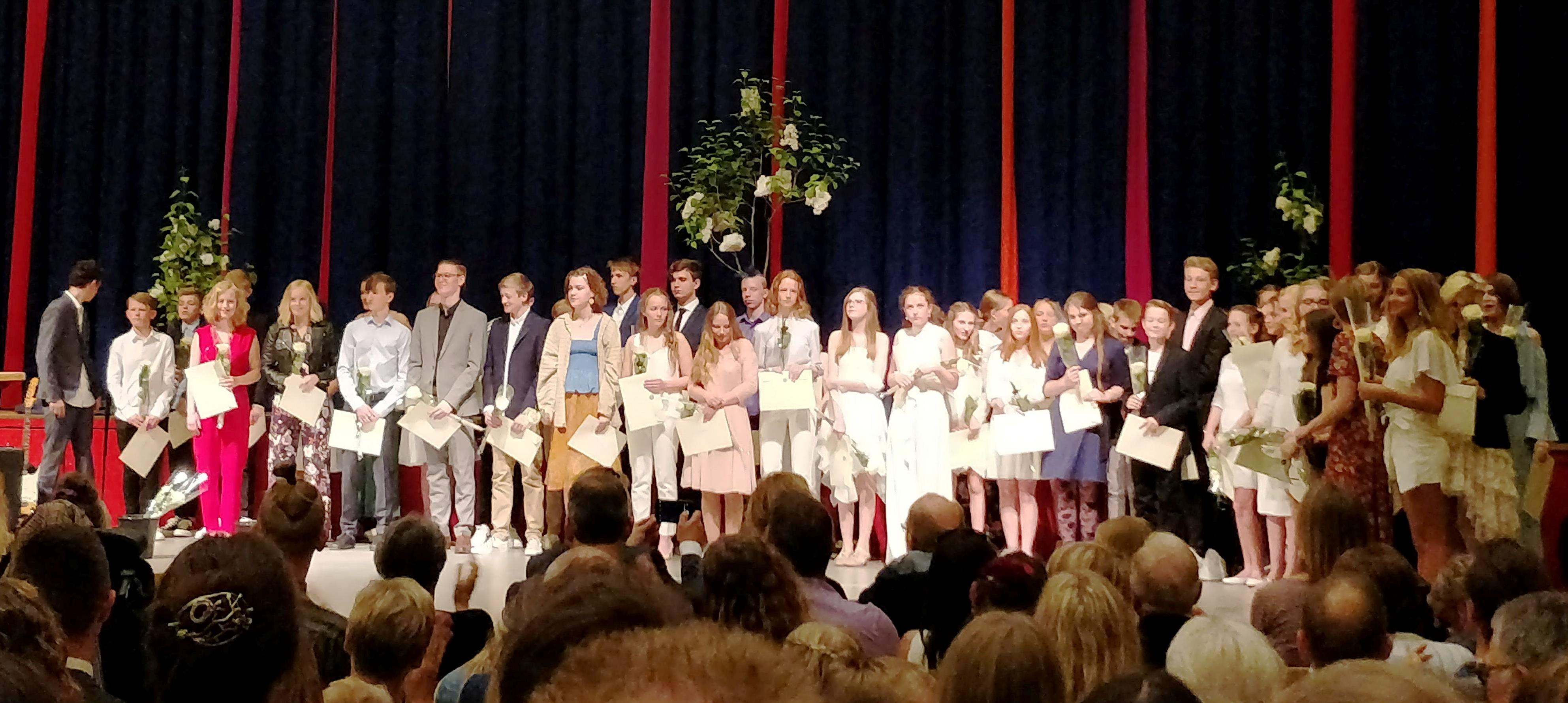 Et hold humanistiske konfirmander ved ceremonierne i 2018 i Valby, som foregik på Sankt Annæ Gymnasium.